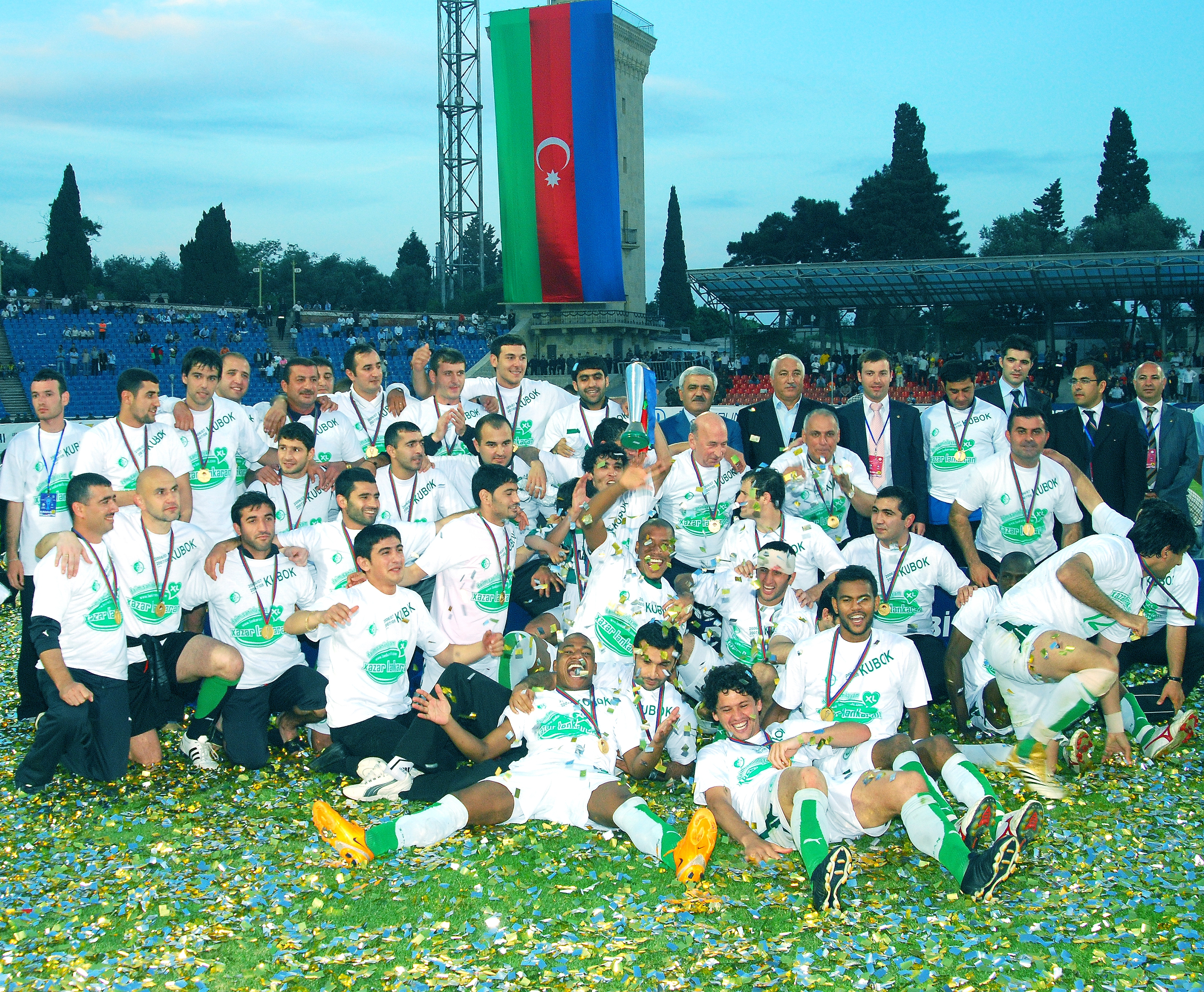 24 may 2008-ci il. "Xəzər Lənkəran" ardıcıl 2-ci dəfə Azərbaycan kubokunun qalibi oldu.